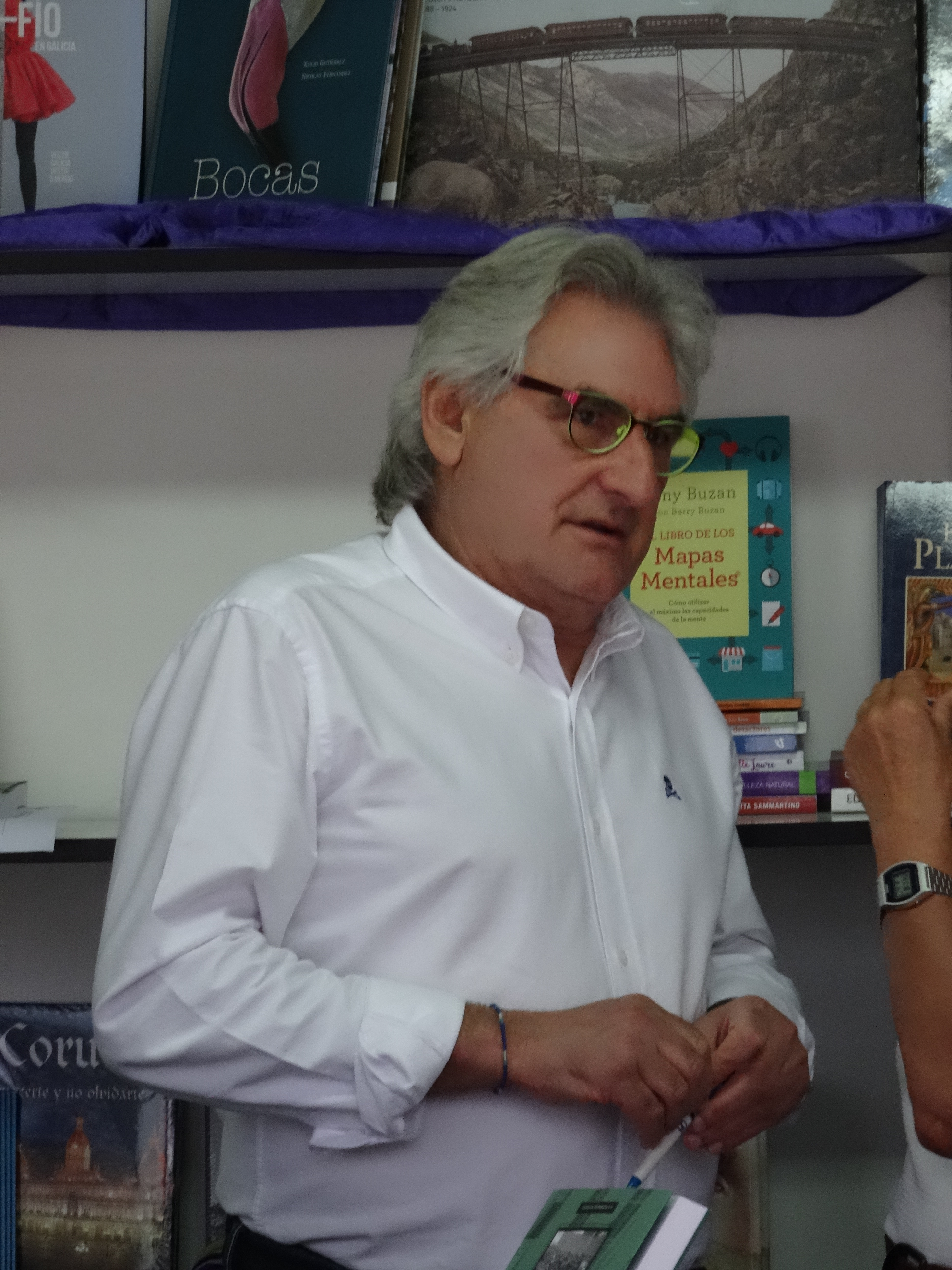 Ver título.